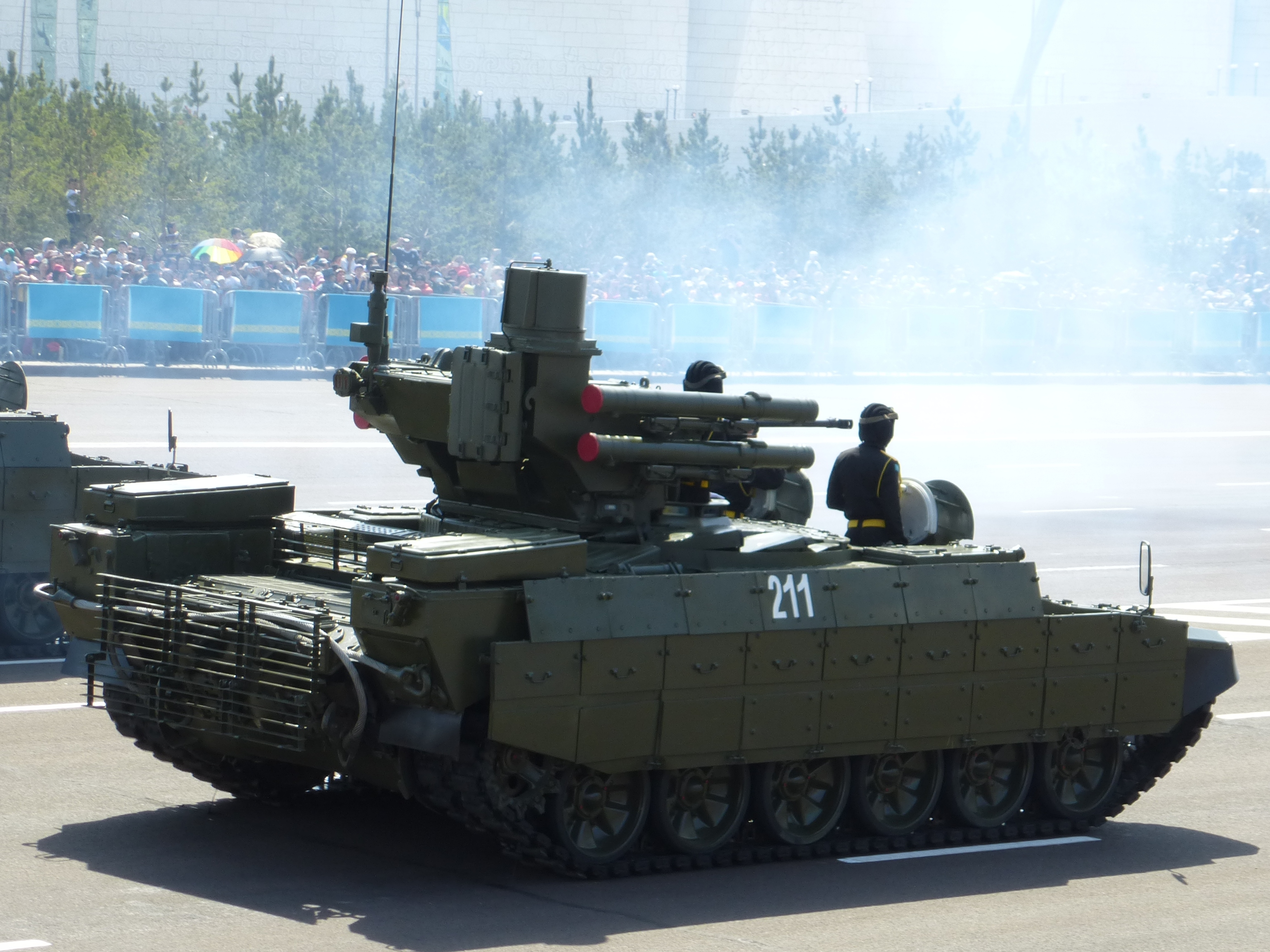 БМПТ "Рамка" на военном параде в г.Нур-Султан 7 мая 2015 года